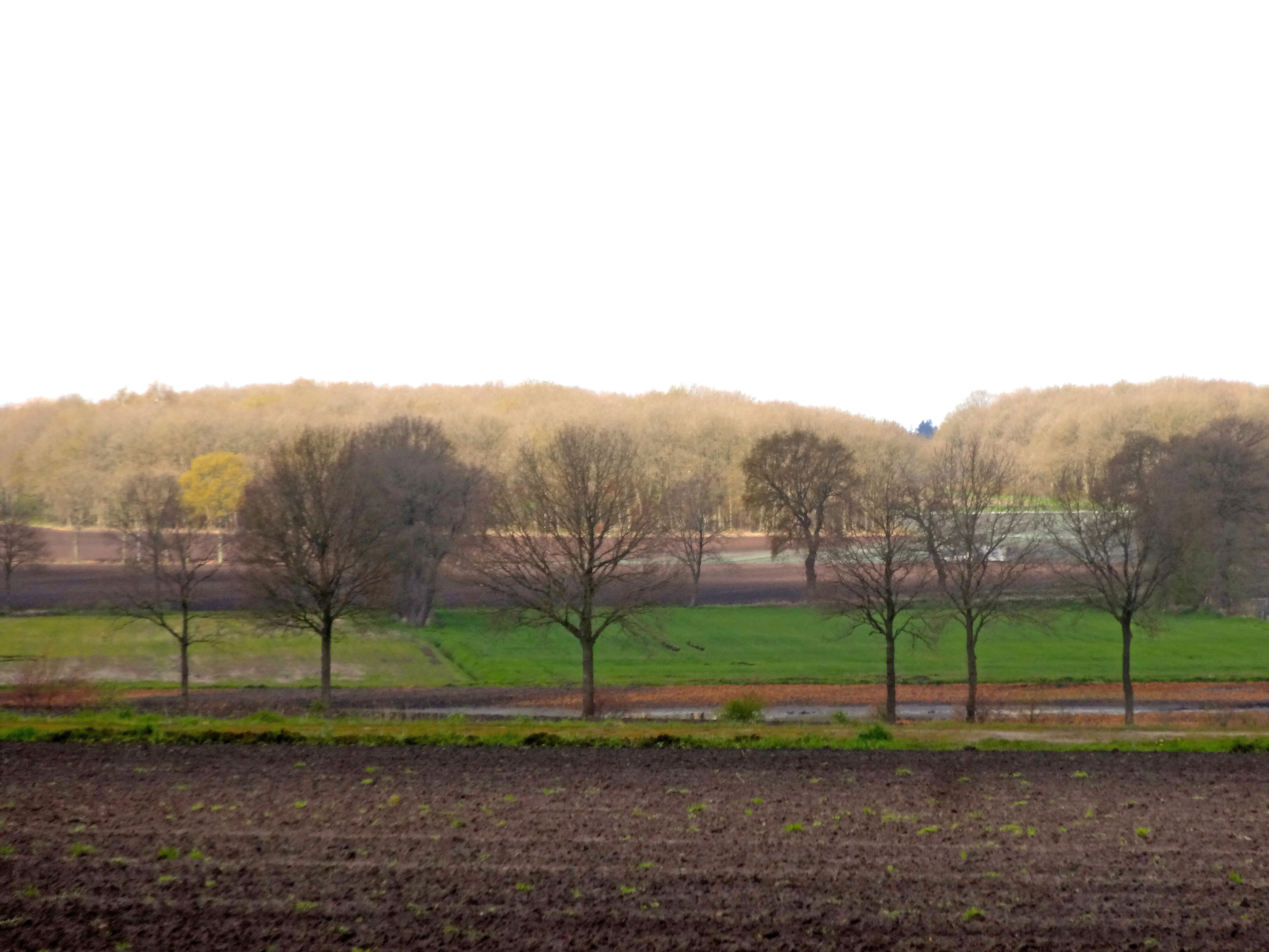 Zicht vanaf de Buurnerbult naar het westen in de richting van de Hondsrug